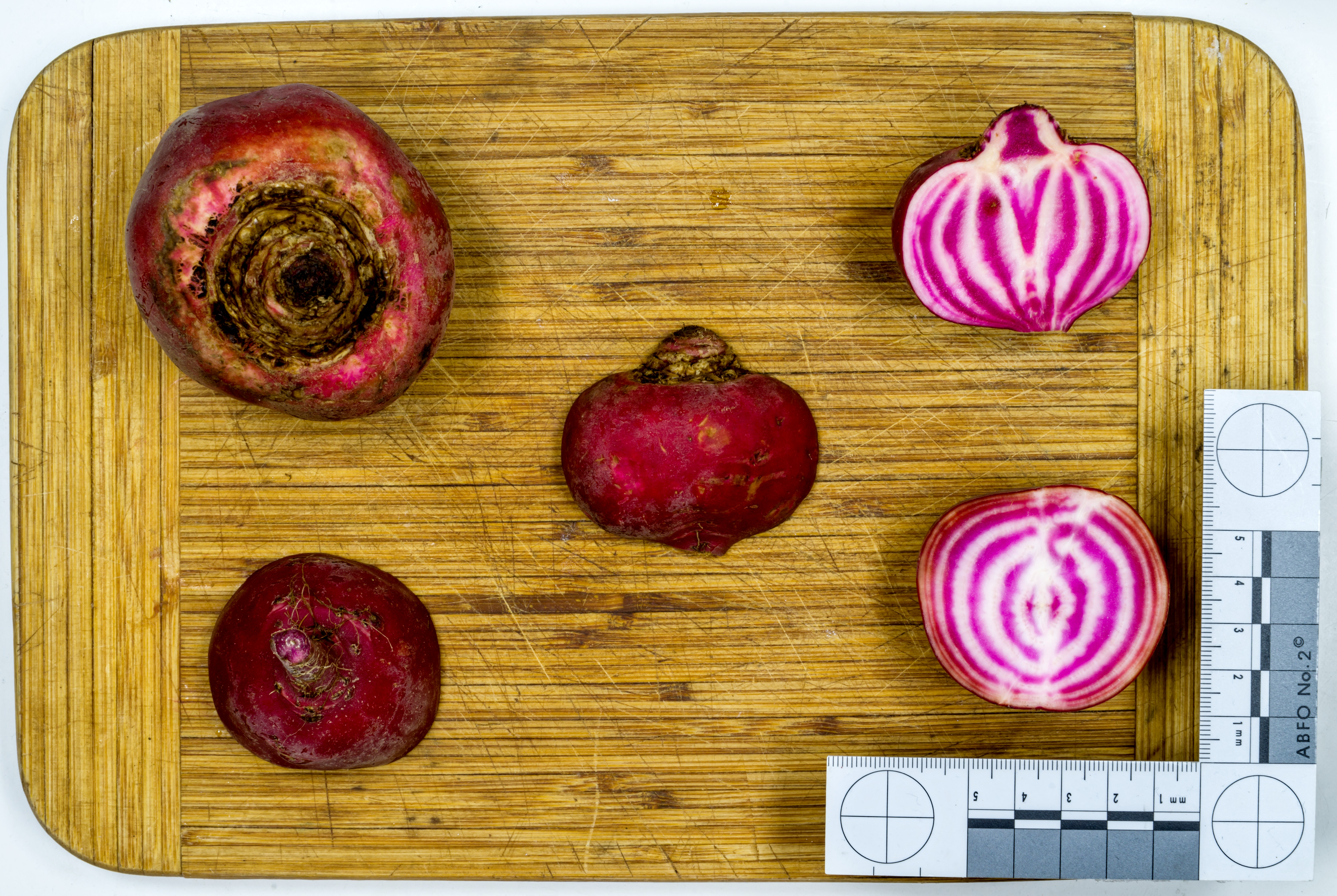 Bilder aus Freiburg im Breisgau Weiß-Rote Beete, Zuchtform der roten Beete